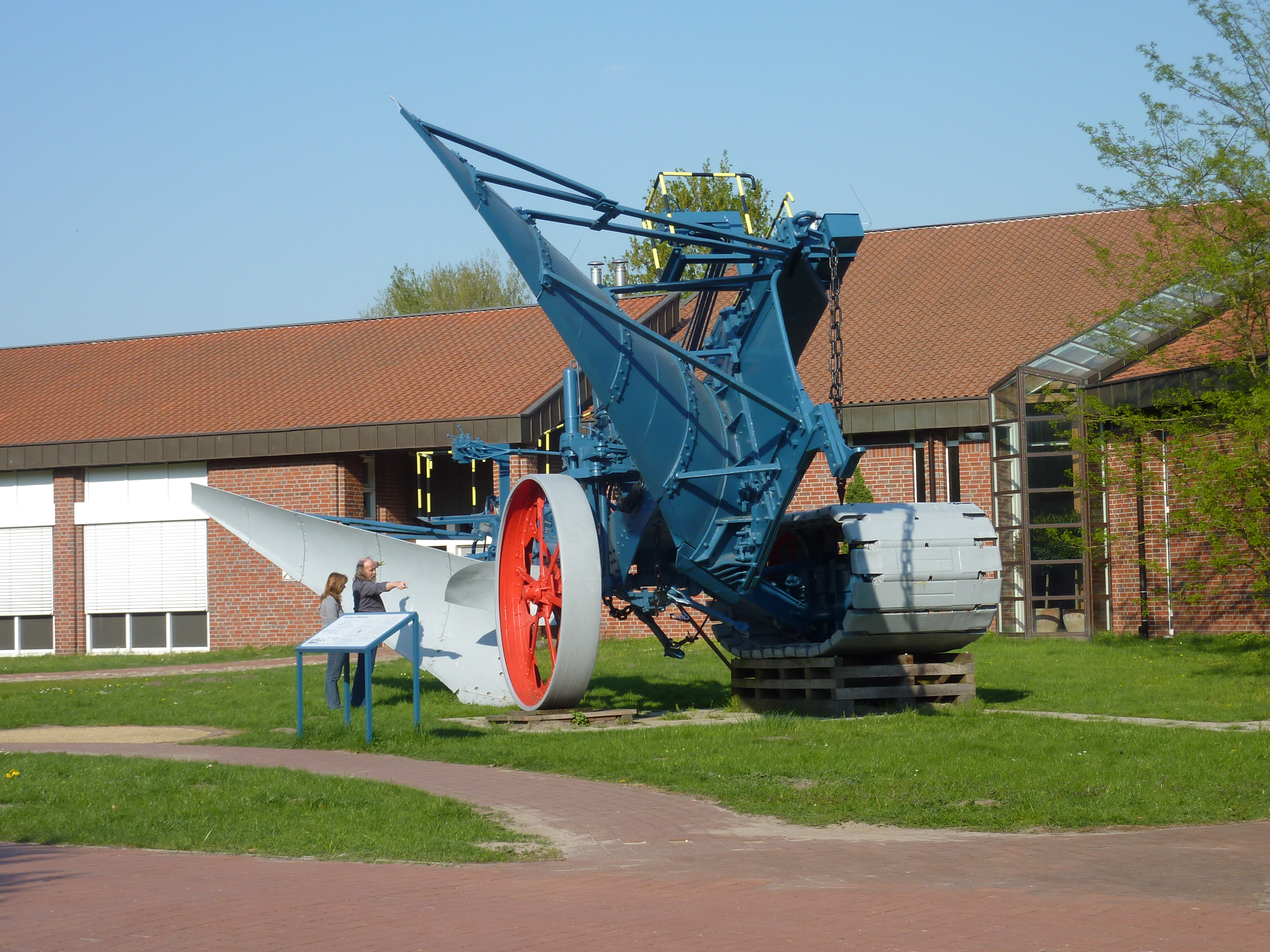 Tiefpflug "Oldenburg" vor dem Museumsdorf Cloppenburg